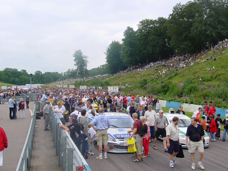 Ring Knutstorp, Newsrace (och Copenhagen Super Prix), 2002-07-21 Gridshow med uppställning av DTC och STCC bilar på Ring Knutstorps startplatta.